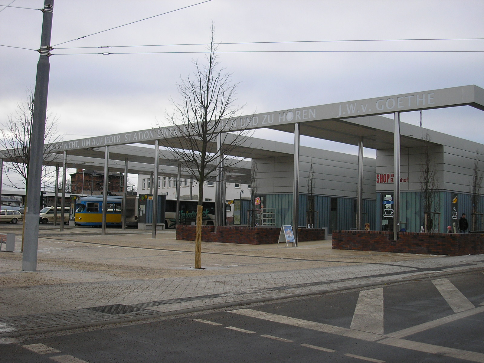 Der Bahnhofsvorplatz von Gotha (Thüringen) mit der Station der Thüringerwaldbahn.